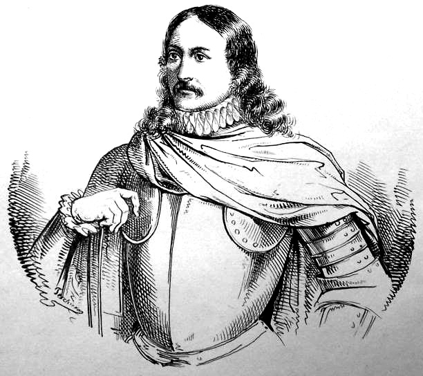 Ligure: litografia de rafigurante o Paganin Doia, pubricâ a Zena do 1835